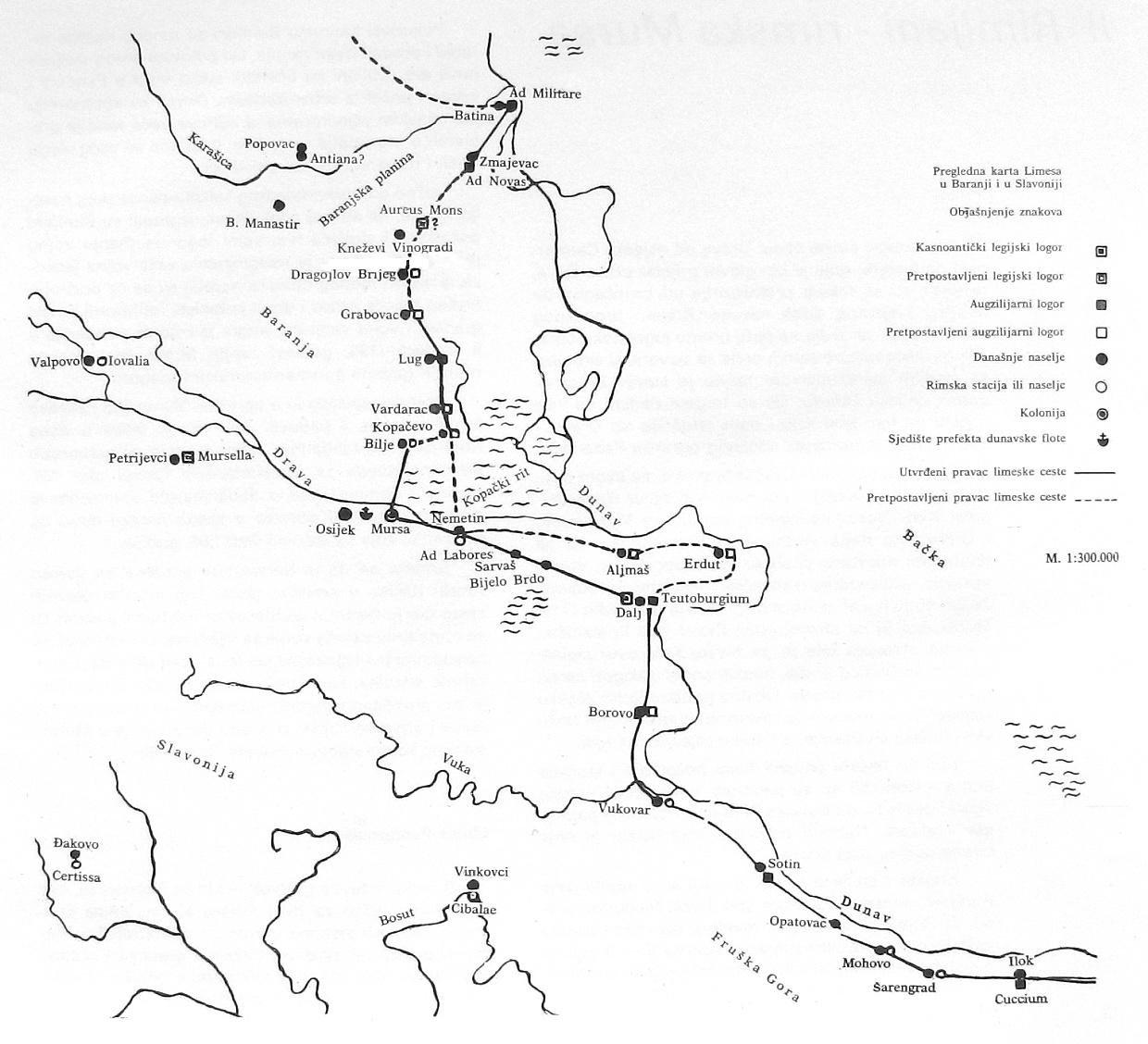 Карта Римског лимеса у Славонији и Барањи (Преузето из књиге "Стари Осијек" Боже Плевника)